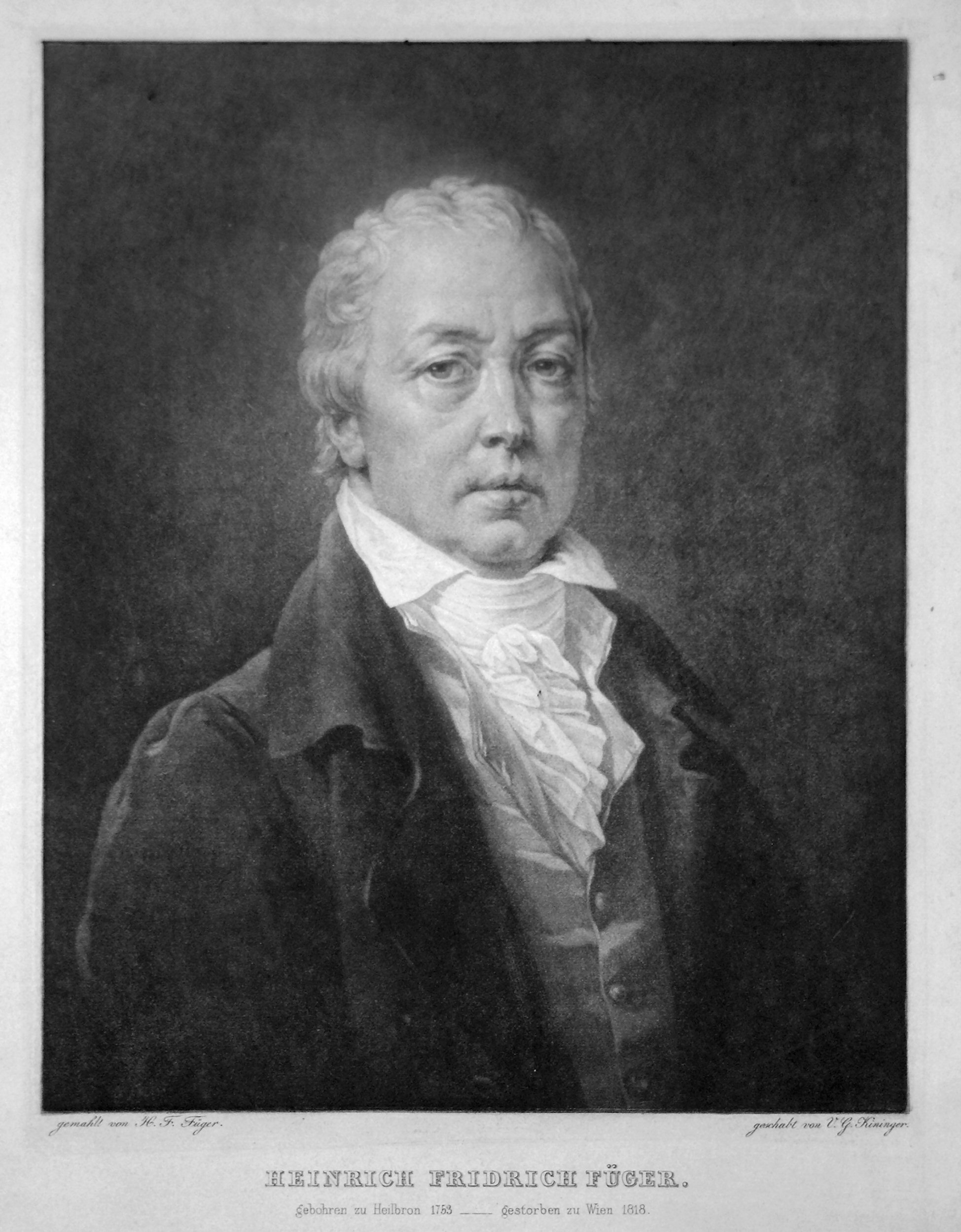 Heinrich Friedrich Füger, Lithographie von Vincenz Georg Kininger, nach einem Selbstporträt, ca. 1830